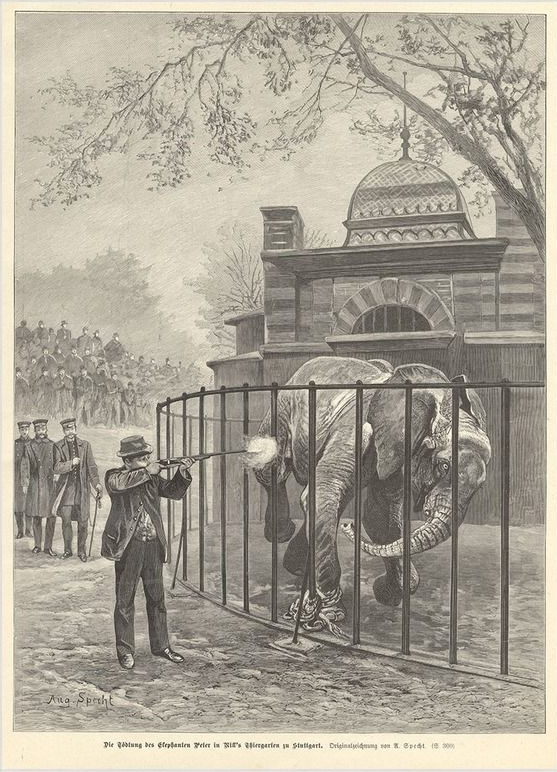 „Die Tödtung des Elephanten Peter in Nill’s Thiergarten in Stuttgart“, 1893, Holzstich von August Specht, signiert: Aug. Specht.